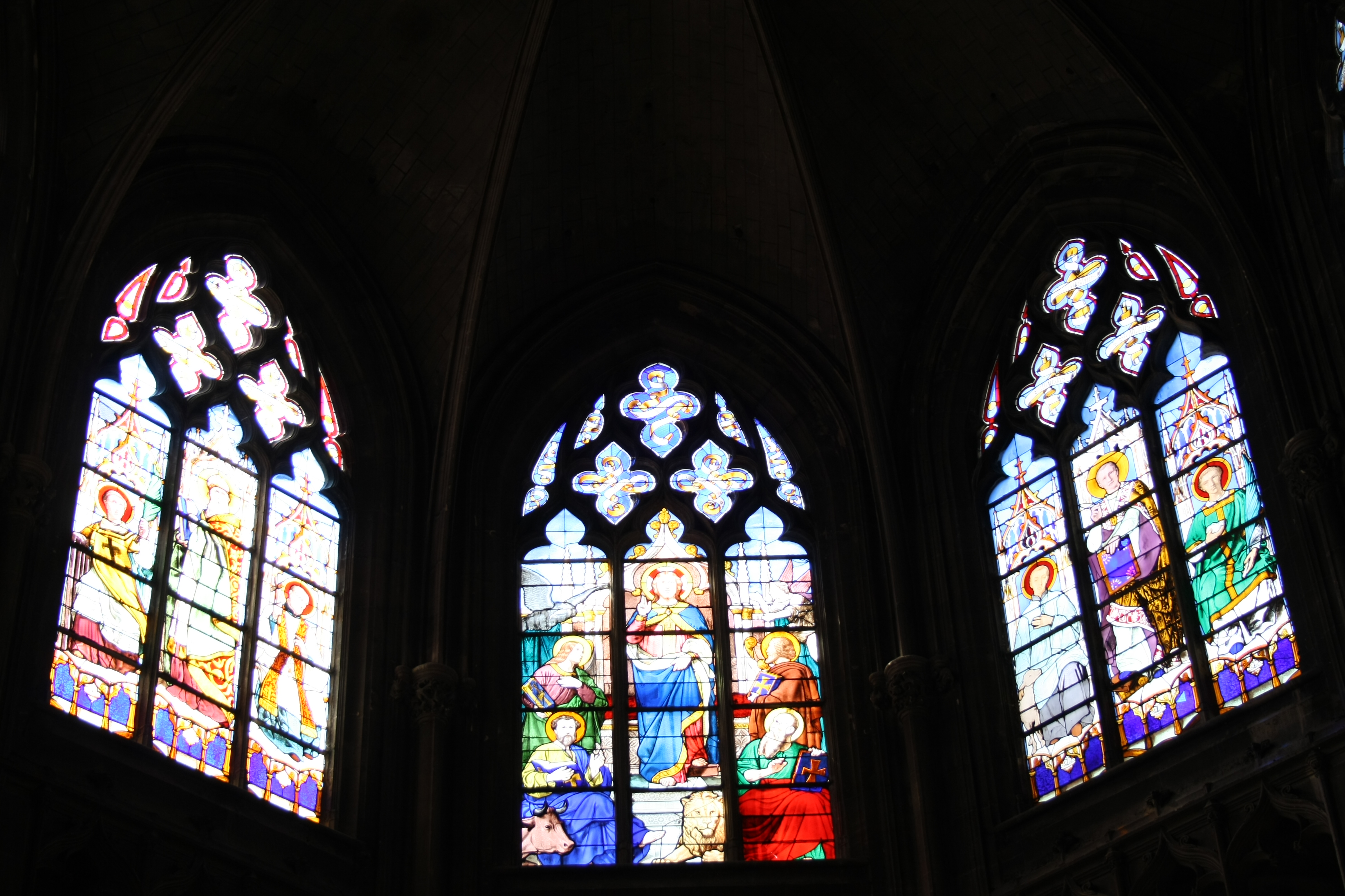 Bleiglasfenster in der Kirche Saint-Bernard de la Chapelle in Paris, Darstellung: ? (drei Chorfenster)